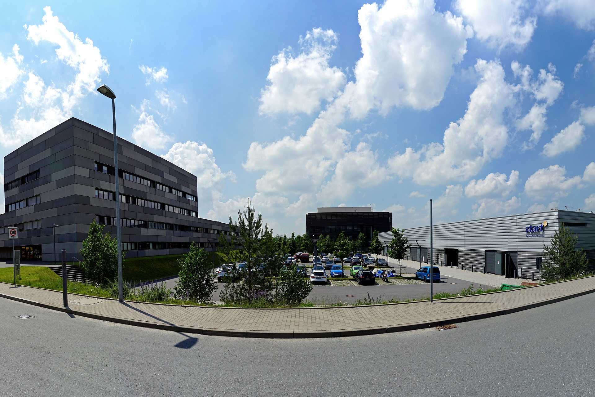 Der Smart Systems Campus in Chemnitz an der Rosenbergstraße, 2016